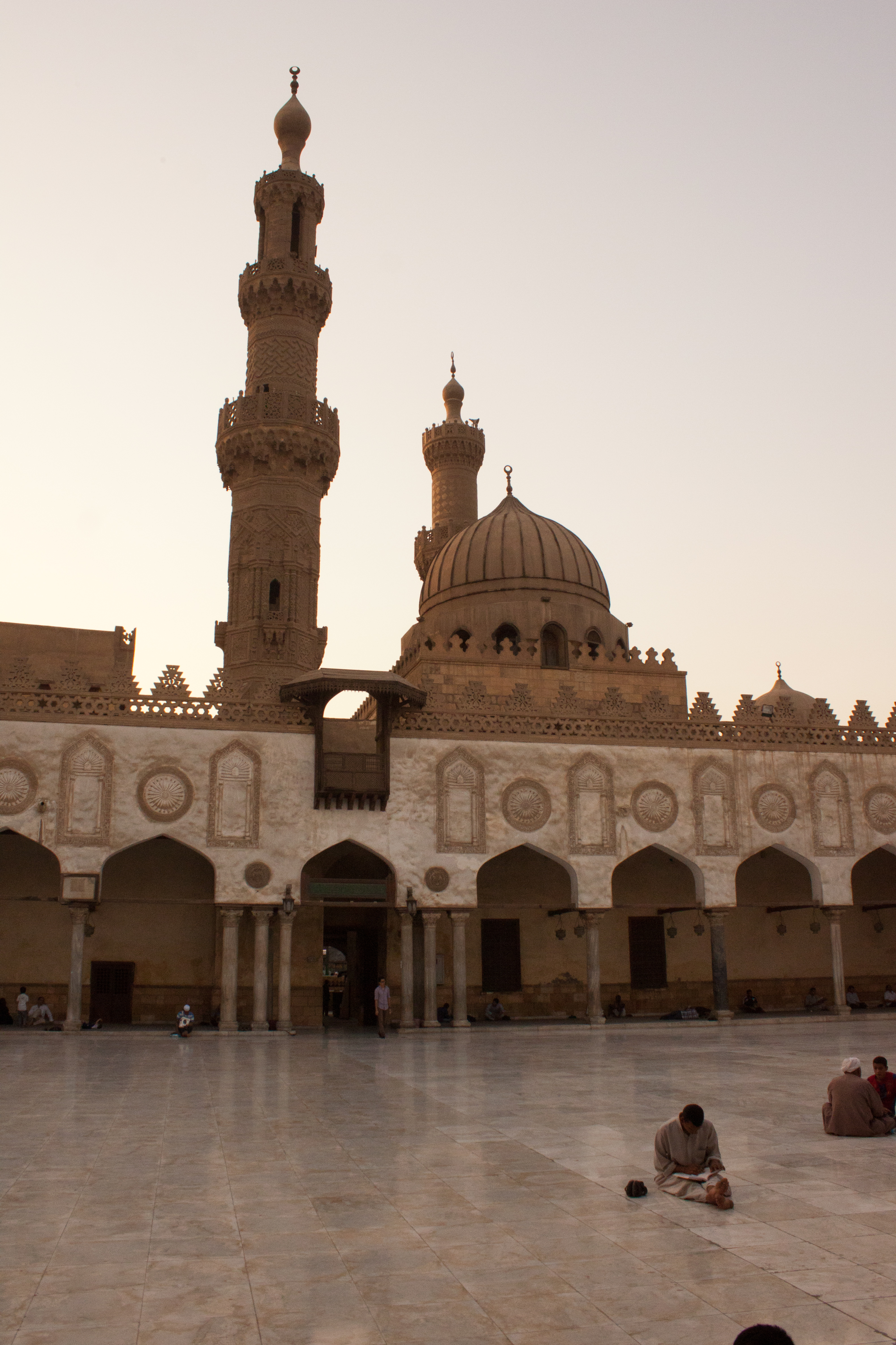 مسجد الأزهر